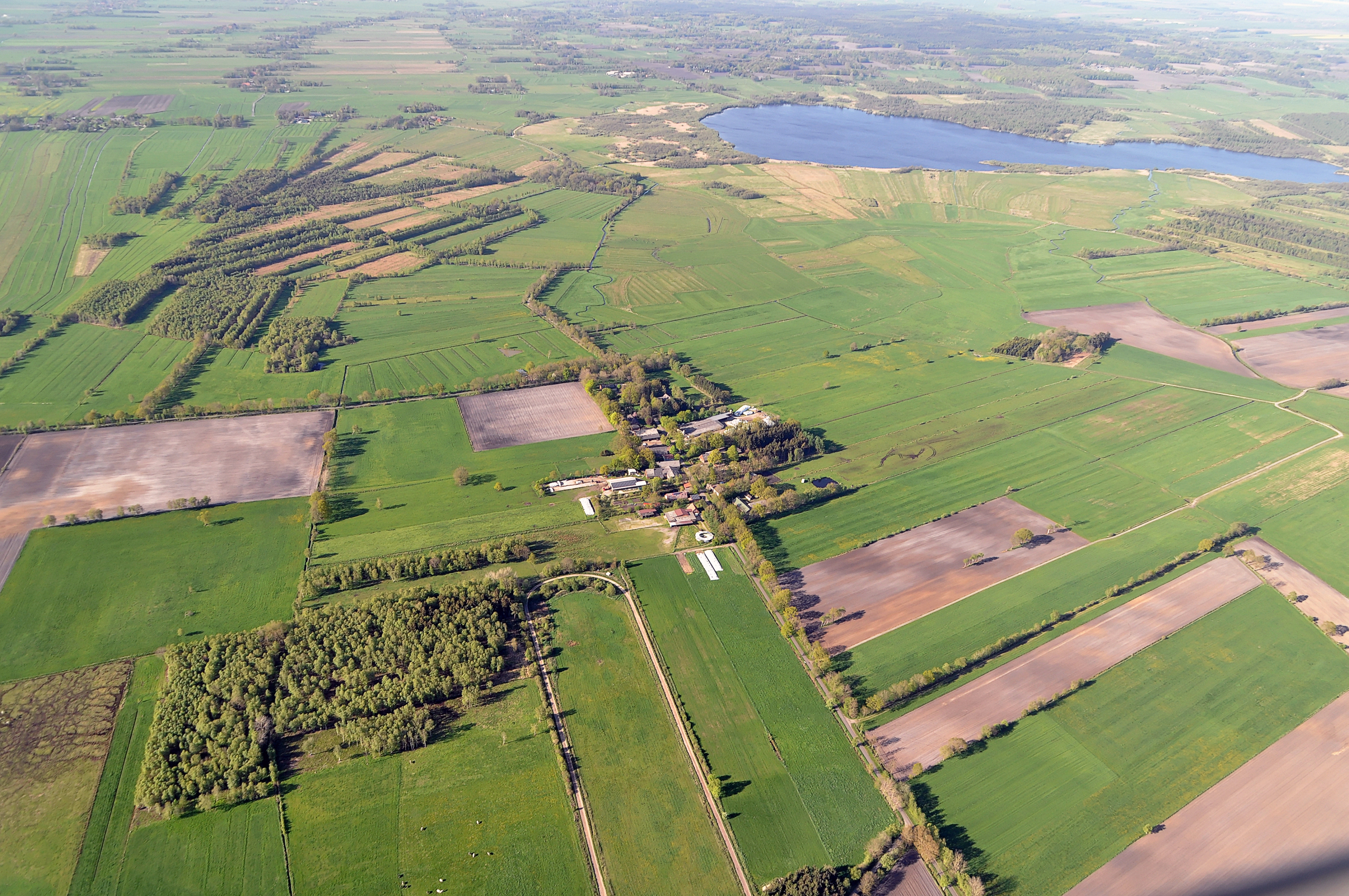 Luftaufnahme von Stinstedt (Dorfteil Eichhofsberg) und des Balksees (oben rechts im Bild), Landkreis Cuxhaven, Niedersachsen (Deutschland)